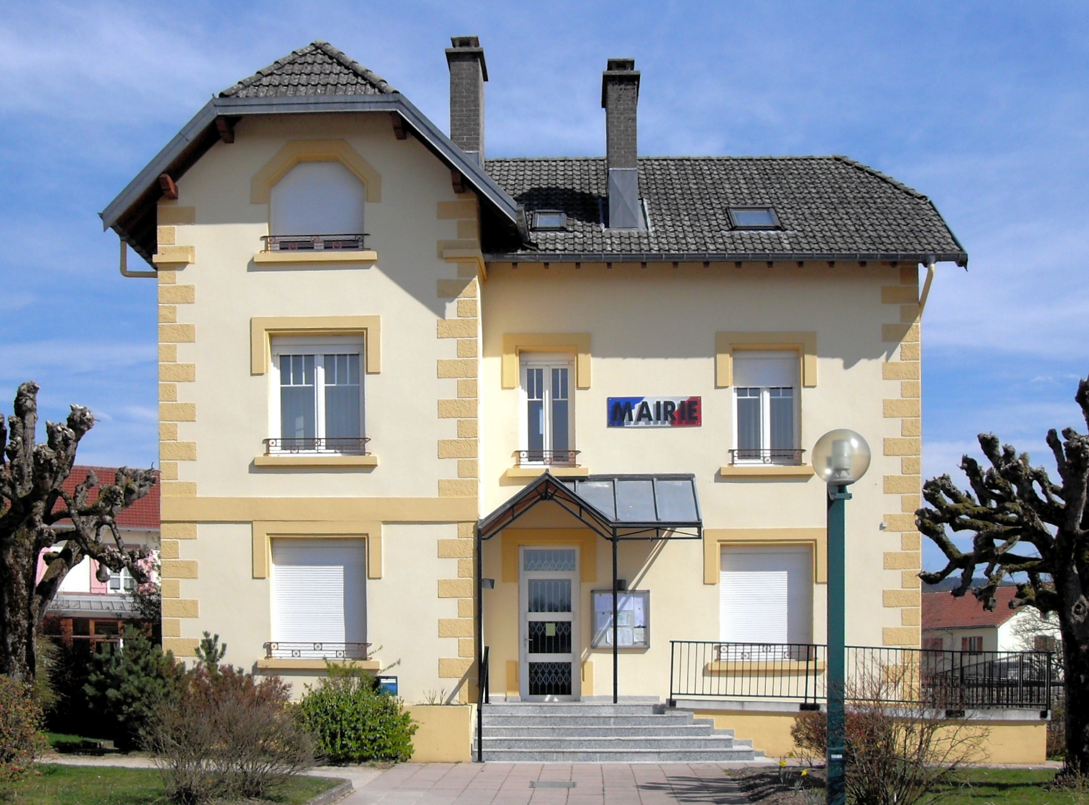 La mairie de Cheniménil